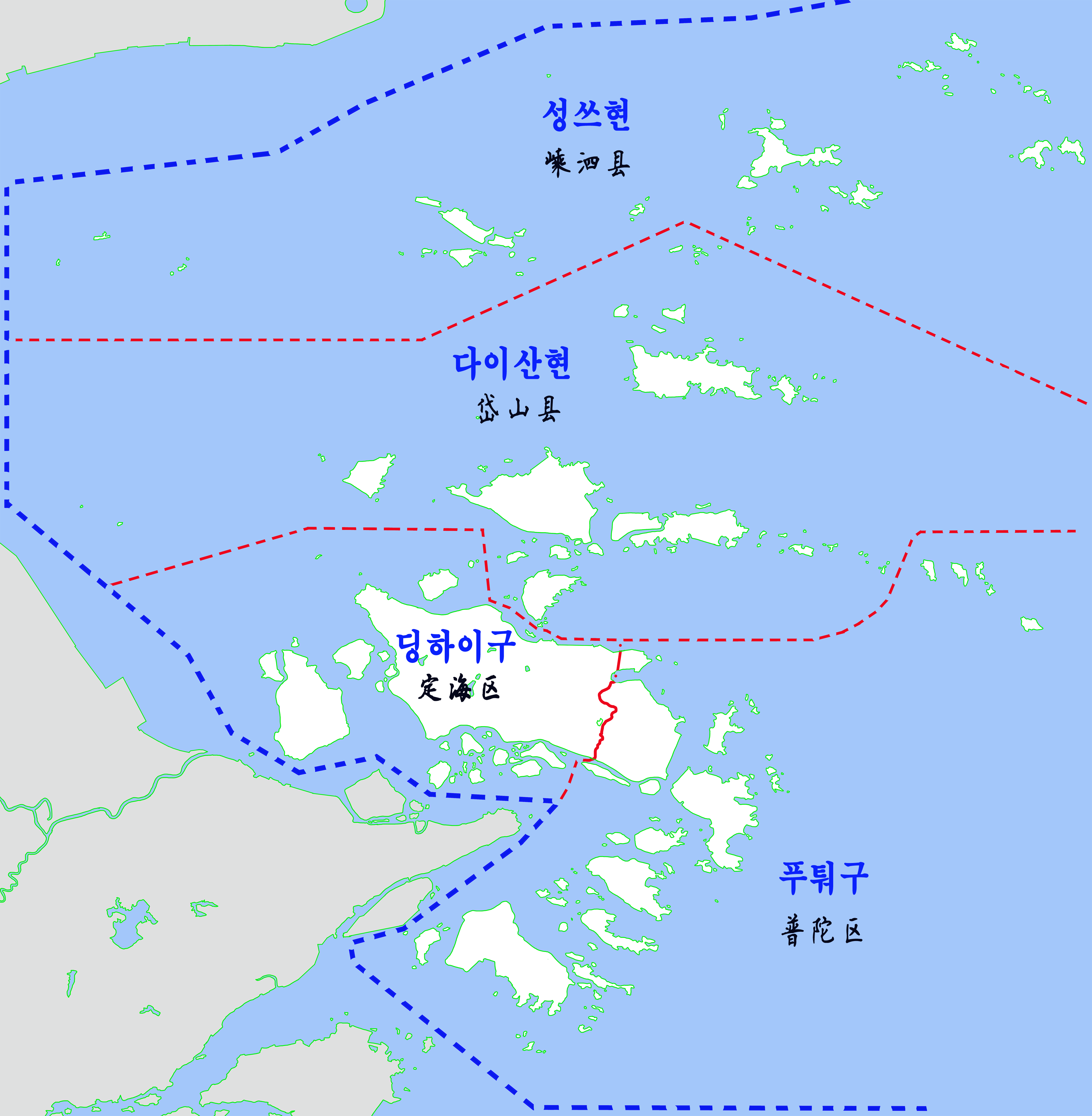 저우산시 행정지도